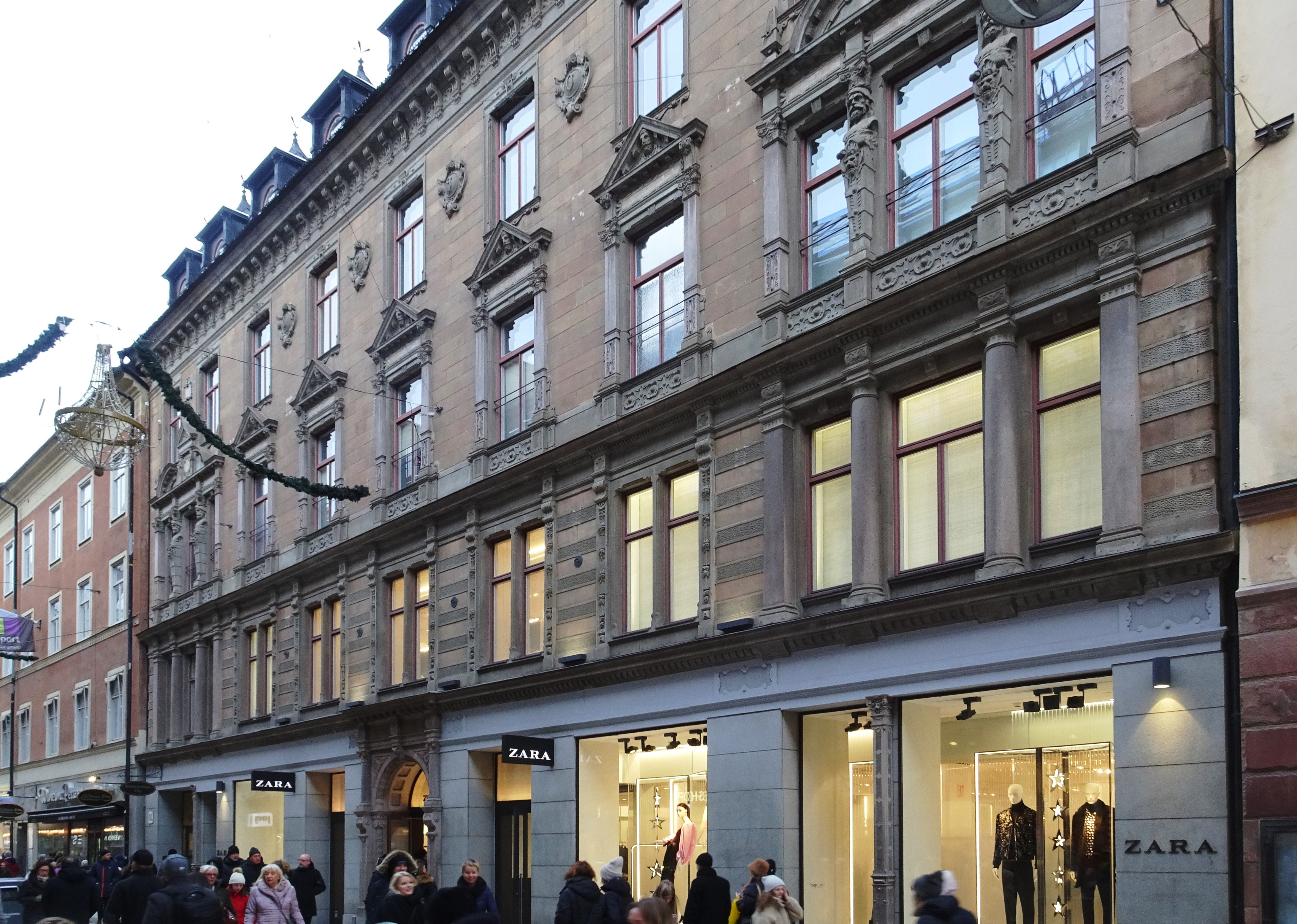 Drottninggatan 68, fastigheten Adam och Eva 17, arkitekt Anders Gustaf Forsberg